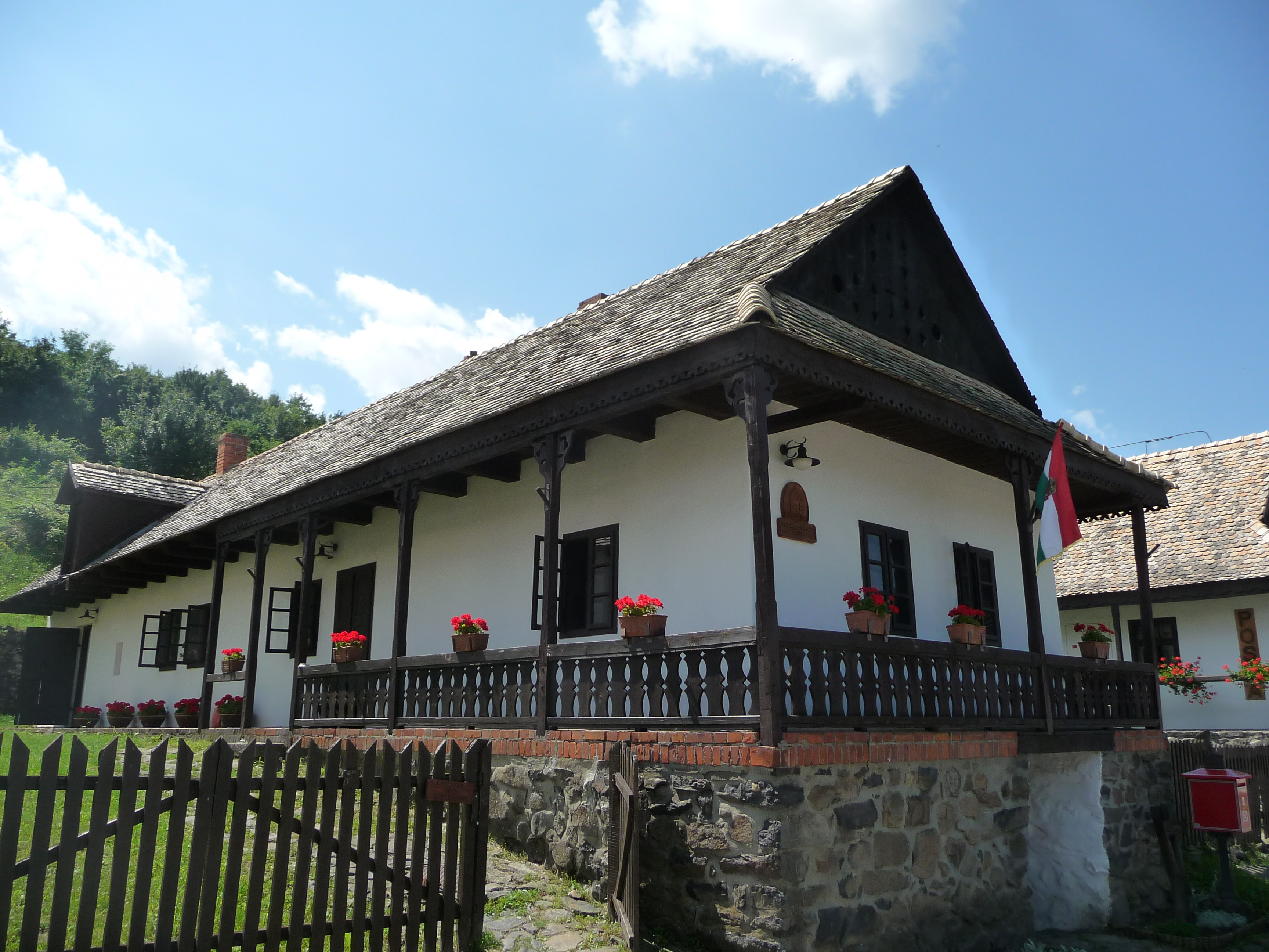 Hollókő önkormányzat, Kossuth út 74.